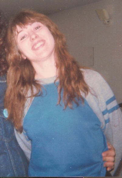 periodista de Argentina.